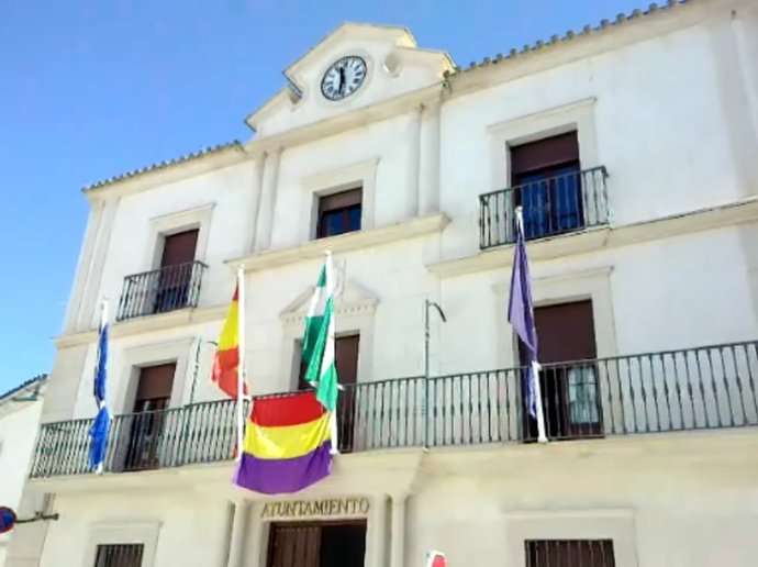 Conmemoración 80º aniversario de la II República en Gilena (Sevilla, Andalucía)